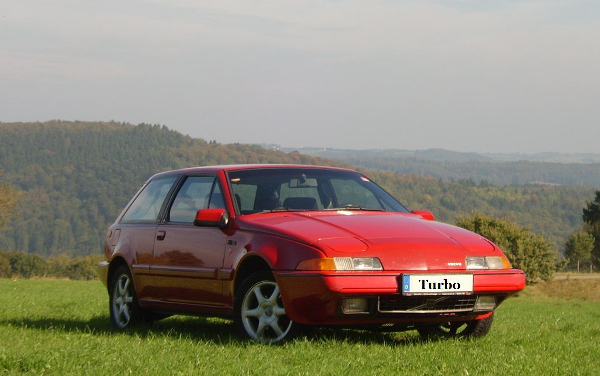 Volvo 480 Turbo, Gebaut im Oktober 1989 im Originalzustand